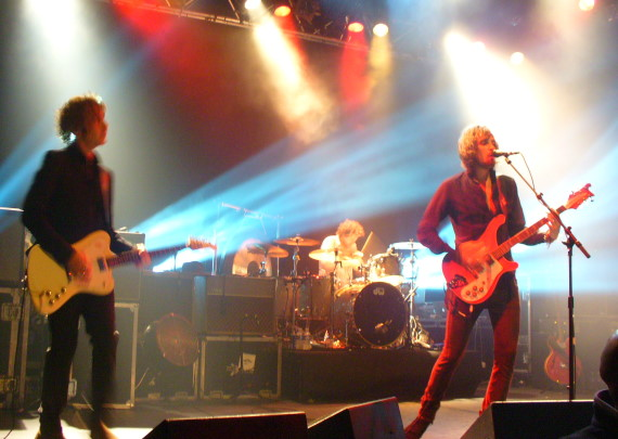 Kasabian en concert le 23 février 2007 au Bataclan